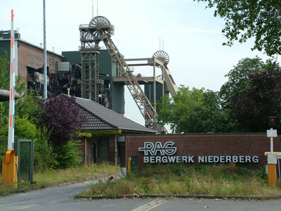 Abbrucharbeiten der Zeche Niederberg